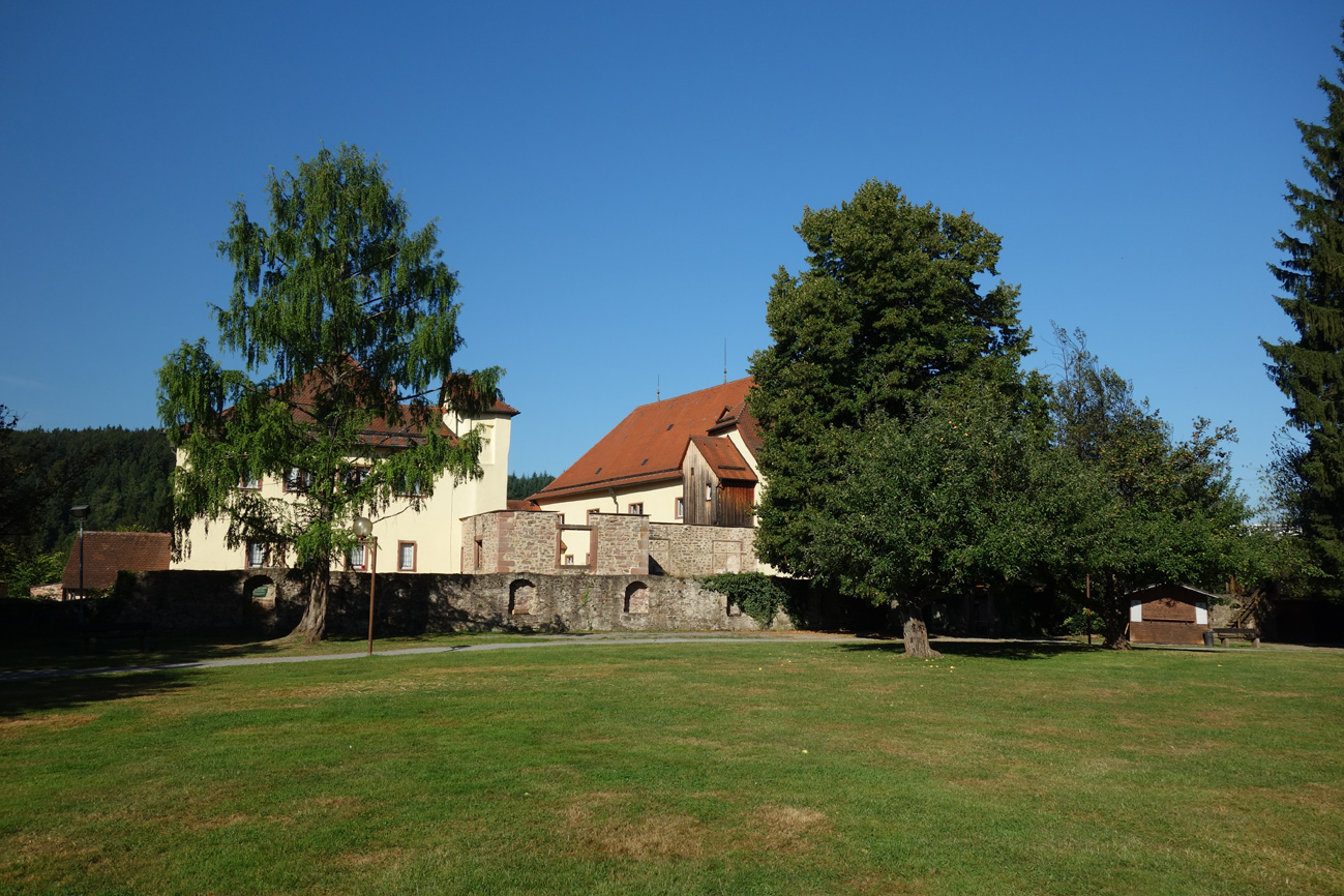 Schlossgarten Neuenbürg